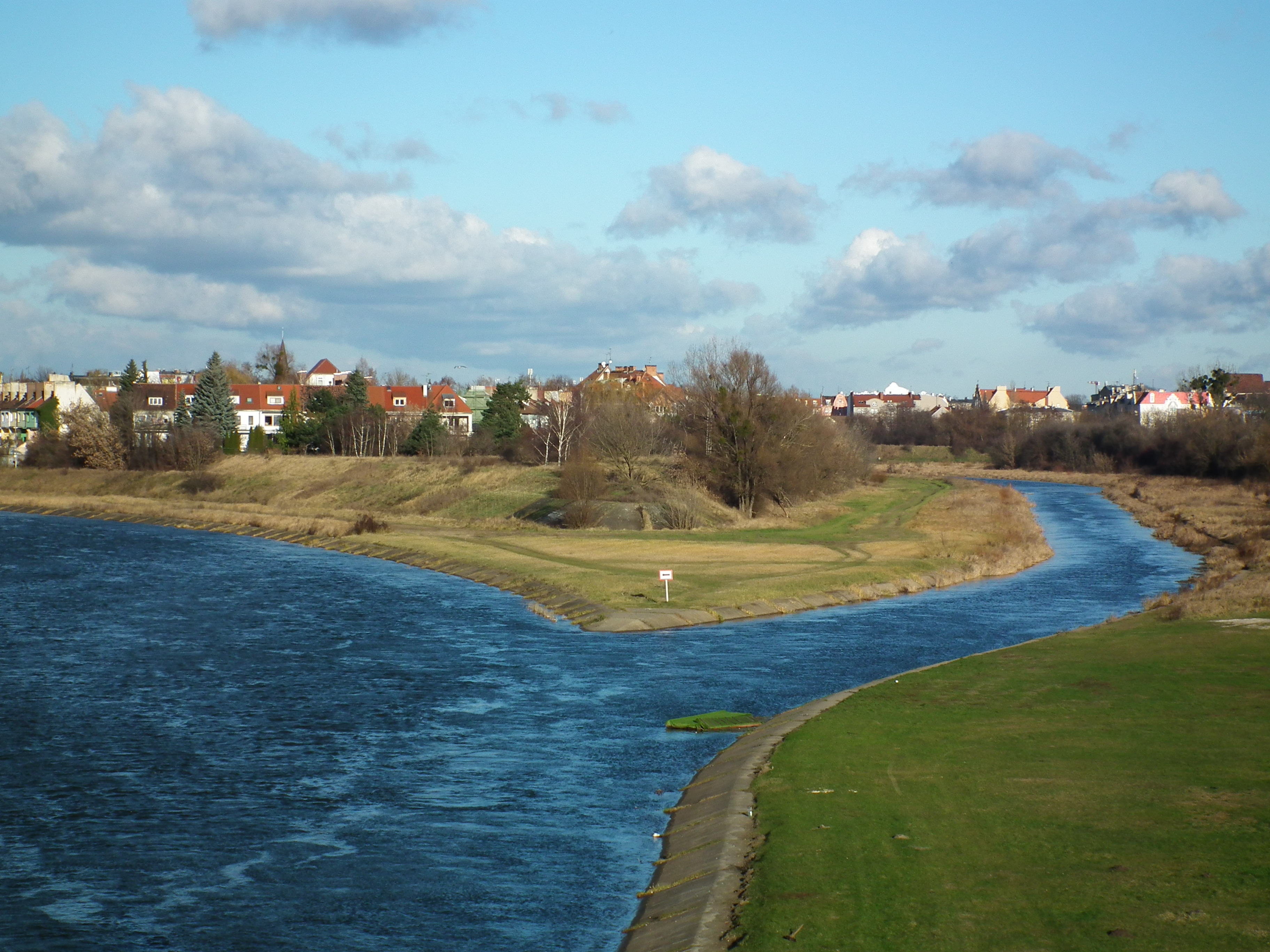 Warta i Ulga w Poznaniu - w środku Ostrów Tumski.